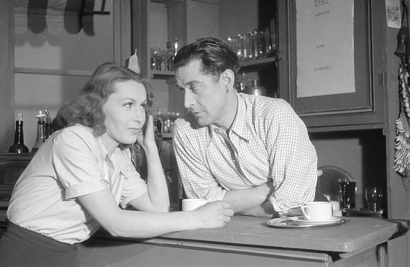 Original image description from the Deutsche FotothekSzenenbilder & Porträt Hans Söhnker (rechts) in der Rolle des Marius, Gerty Soltau (links) in der Rolle der Fanny